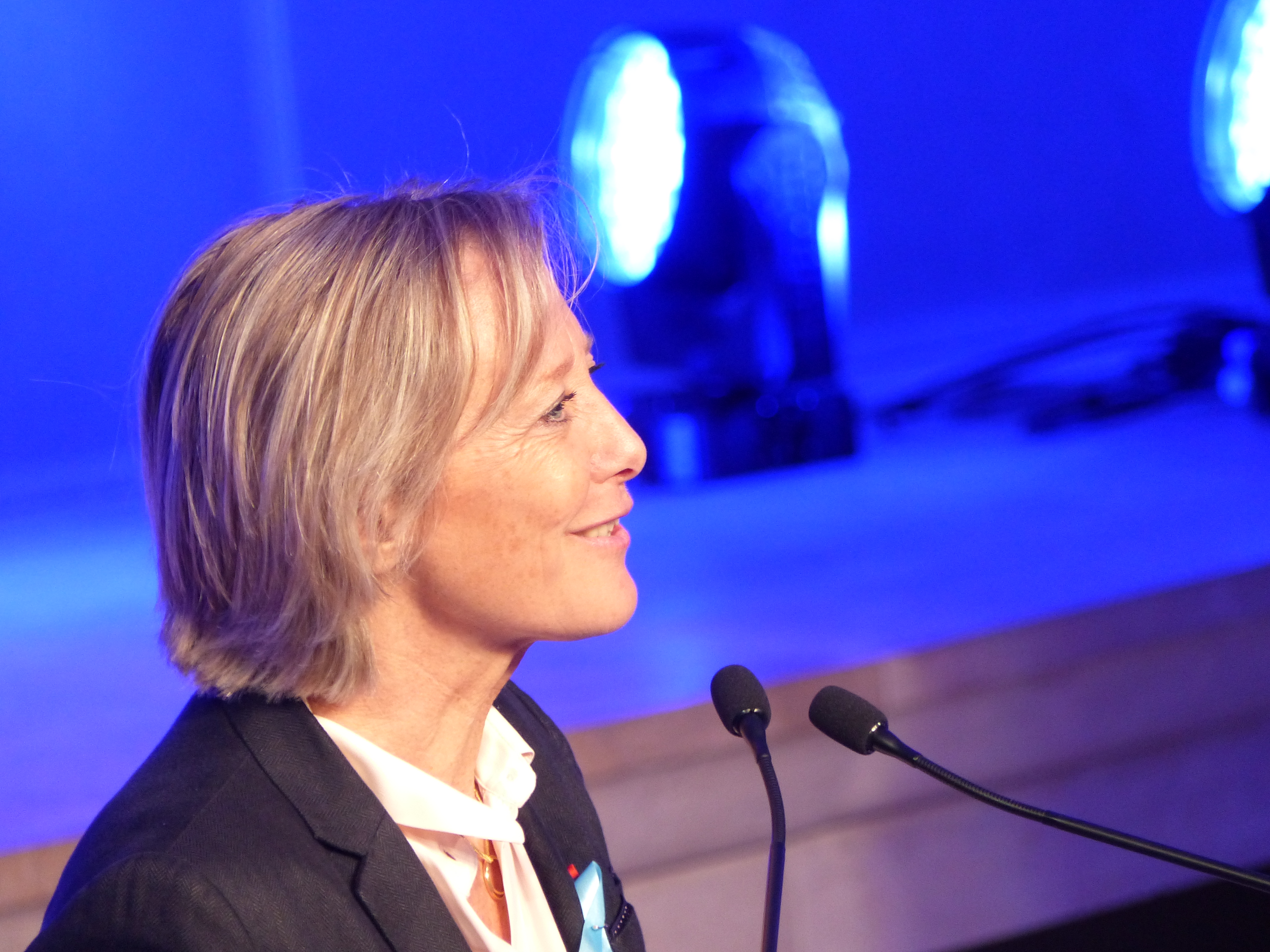 Sophie Cluzel, secrétaire d'Etat aux personnes handicapées, lors du lancement du 4e plan autisme (ou stratégie autisme) le 6 avril 2018.